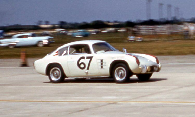 Bandini GT Zagato 750. Sebring, Florida, March 1960.